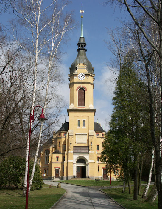 Die Kirche im Sächsischen Krankenhaus Großschweidnitz, geweiht 1902, Höhe 35 m